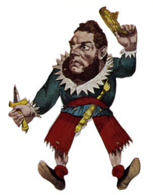 Zitz, Abgeordneter der Frankfurter Paulskirche, dargestellt als Hanswurst. Kolorierte Lithografie der Firma E. G. May, Frankfurt.